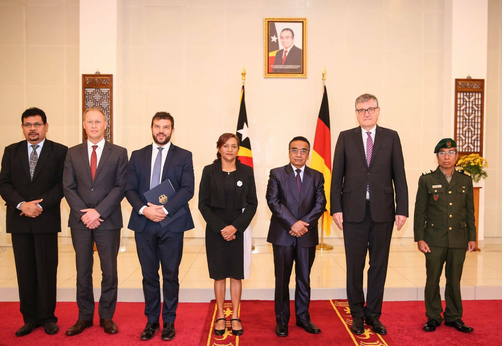 Der deutsche Botschafter Peter Schoof und Osttimors Präsident Francisco Guterres mit deutschem Botschaftspersonal und osttimoresischen Beamten. Ganz links: Der zivile Stabschef (Chefe de Casa Civil) des Präsidenten Francisco Maria de Vasconcelos; ganz rechts: Der Chefe de Casa Militar Oberst António Soares da Silva („Mau Kalo“)